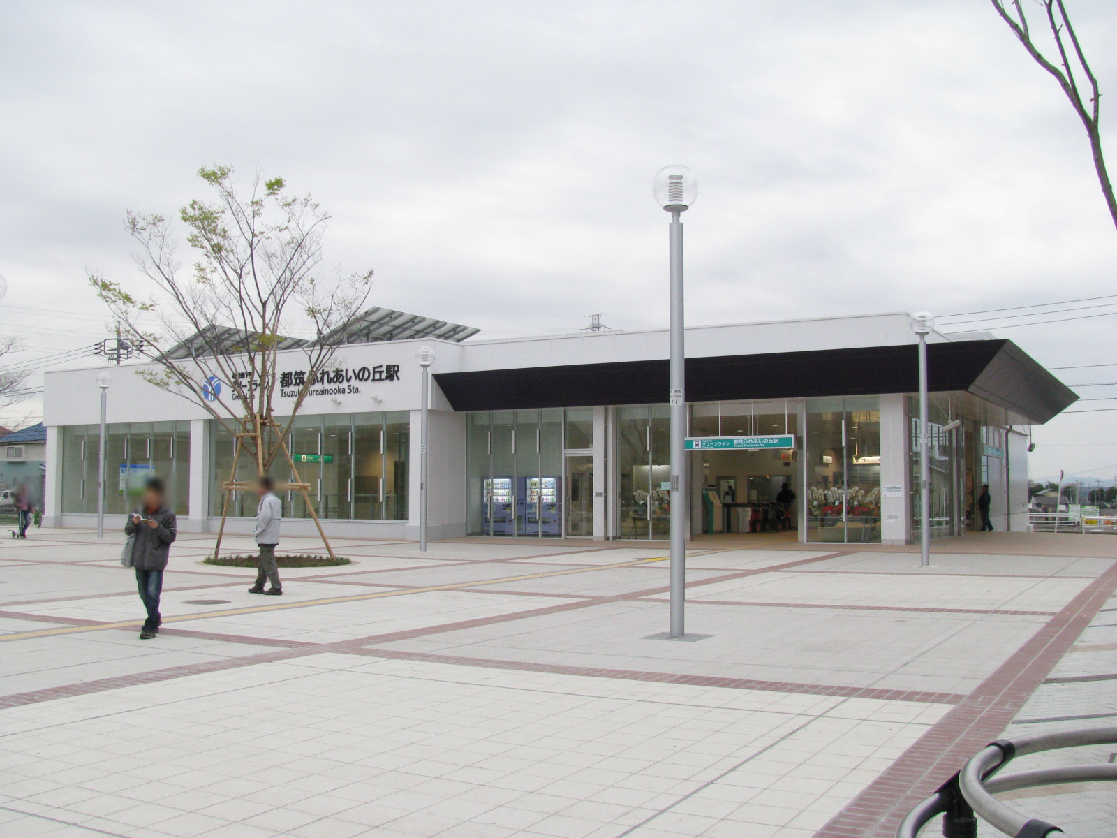 横浜市営地下鉄グリーンライン都筑ふれあいの丘駅